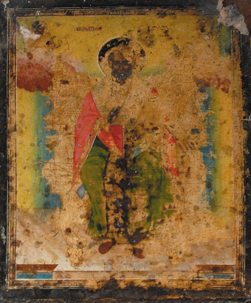 Икона на " Свети Никола " в храм " Свети Никола " в гр. Черноморец